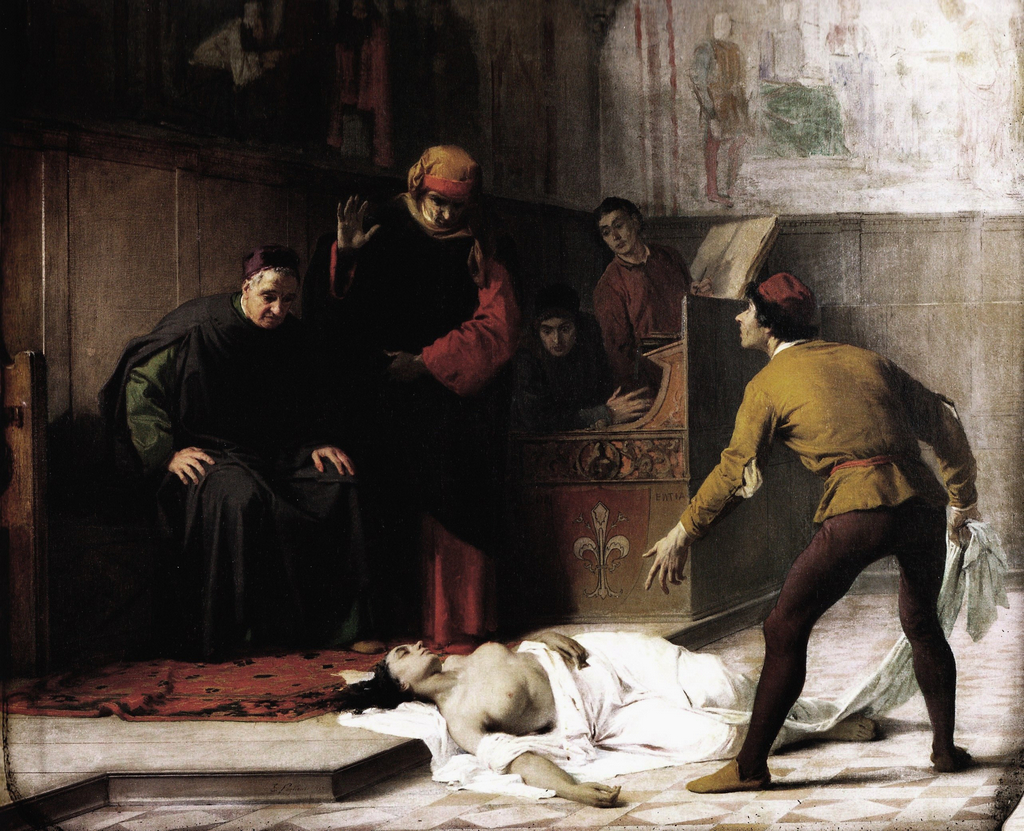 Il dipinto, ambientato nella Firenze del XV secolo, rappresenta l’episodio che, secondo la tradizione, portò alla ricostituzione della Compagnia della Misericordia. Fondata nel Duecento, questa confraternita aveva tra i propri compiti la sepoltura degli indigenti, incarico da cui fu sollevata nel 1425, quando per volere delle autorità politiche fu fusa con la Compagnia del Bigallo. La tela illustra il drammatico momento in cui un cittadino porta davanti al gonfaloniere il corpo di una giovane donna, lasciato insepolto in Santa Croce poiché giunto oltre l’orario deputato alle sepolture. Questo atto provocatorio avrebbe reso evidente la necessità di ricostituire la Compagnia della Misericordia e di affidarle nuovamente tutte le sue mansioni. Secondo i dettami della pittura di storia, il tema di ispirazione quattrocentesca, è affrontato dall’artista con grande cura nella corretta caratterizzazione degli abiti dei personaggi e nella convincente ambientazione della scena. Alla luce degli insegnamenti di Domenico Morelli, Pagliano innesta tuttavia sul soggetto di storia una sensibilità verista, facendo dei propri personaggi non già le comparse di una rievocazione in costume, ma gli attori di un dramma